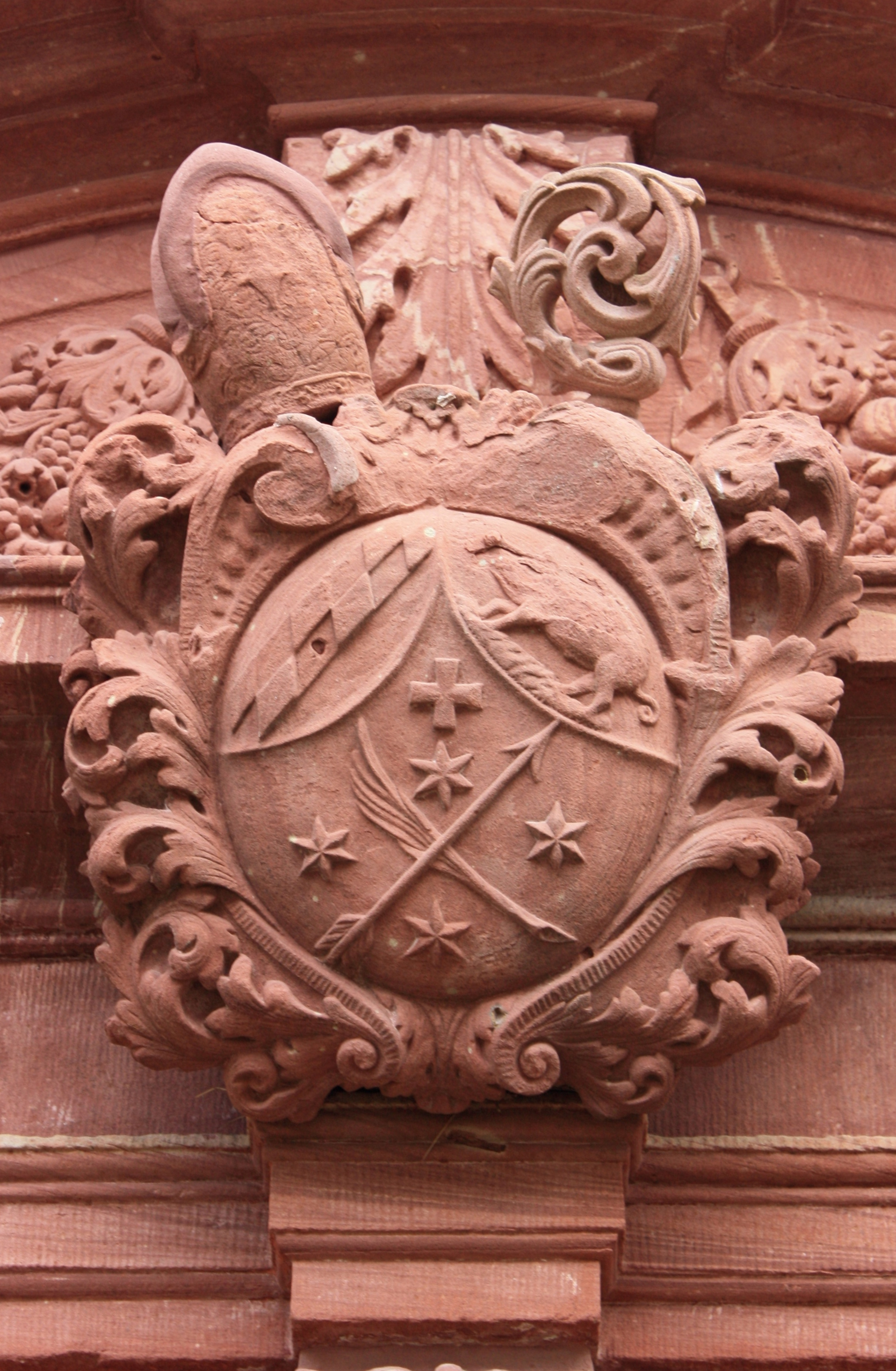 Kloster Eberbach: Abtwappen von Abt Michael Schnock